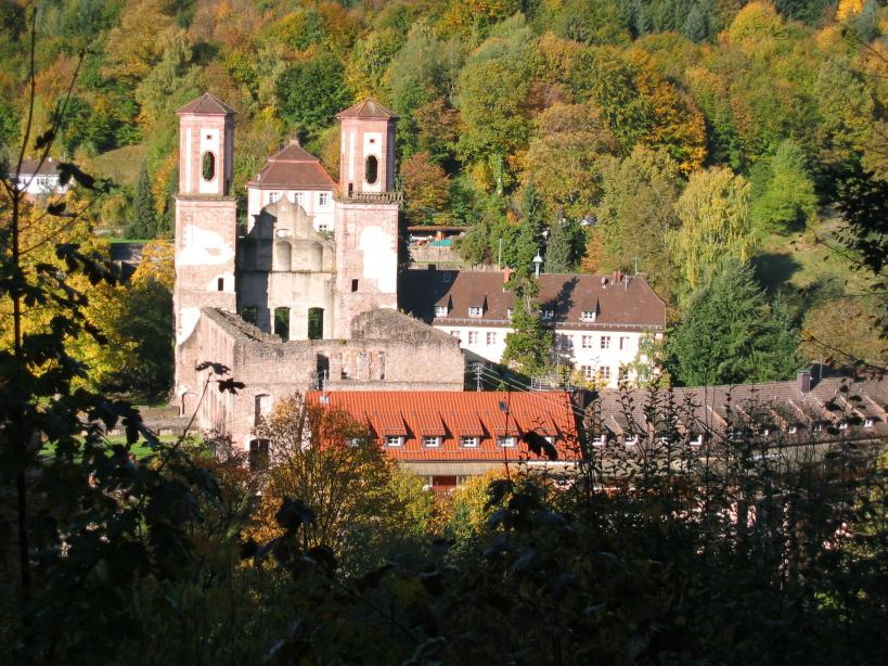 Klosterruine Frauenalb im oberen Albtal im Nordschwarzwald. Eigenes Bild vom 22.10.2004